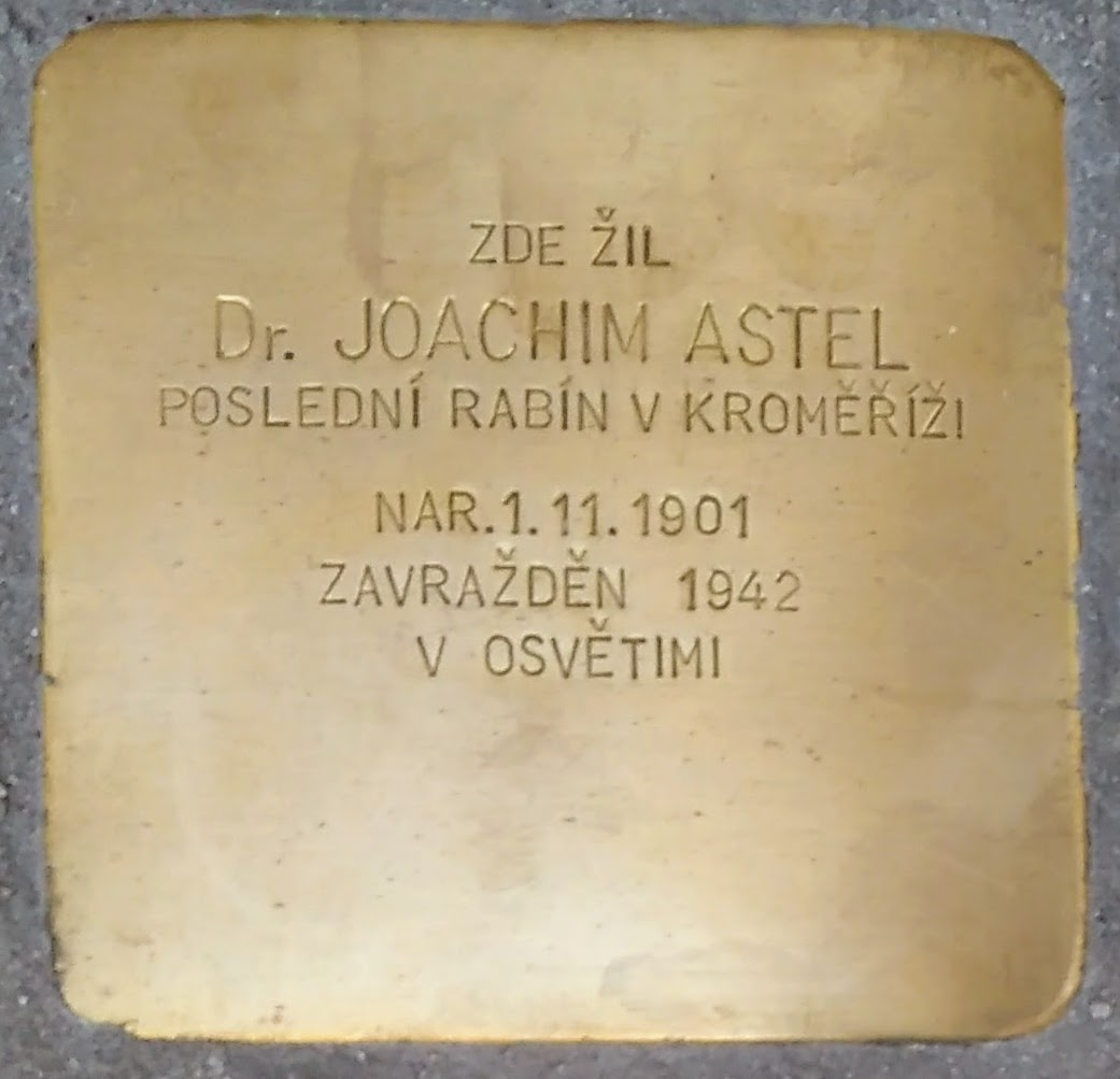 Stolpersteine in Kroměříž - Joachim Astel